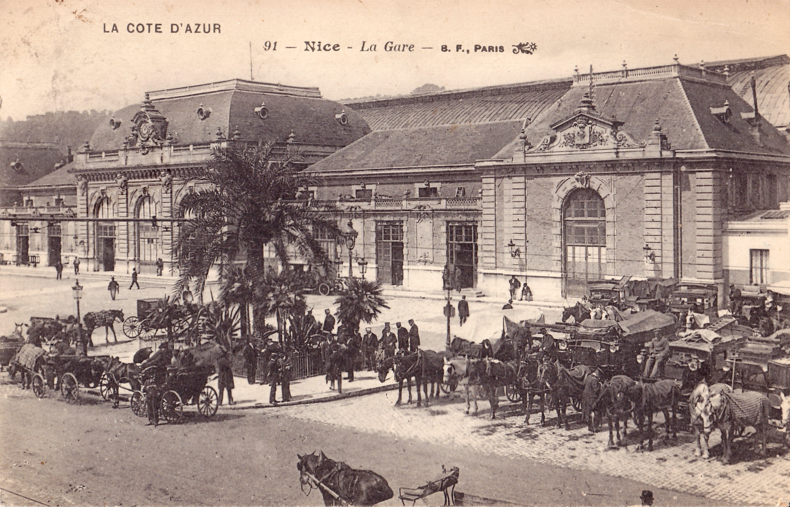 Carte postale ancienne éditée par BF à Paris :NICE - La Gare